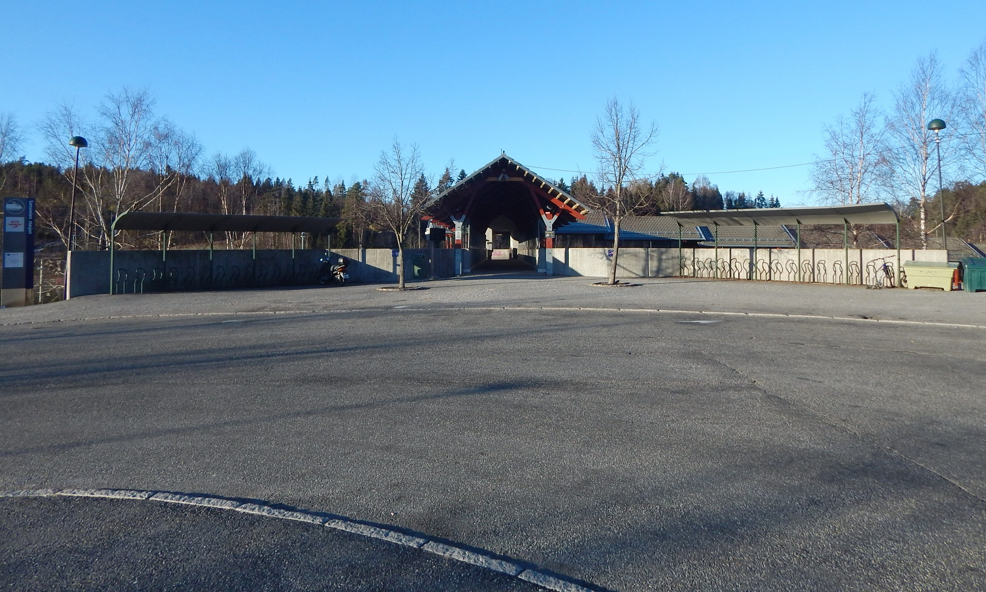 En arm av fylkesvei 151 ender i en snuplass ved Sonsveien holdeplass.